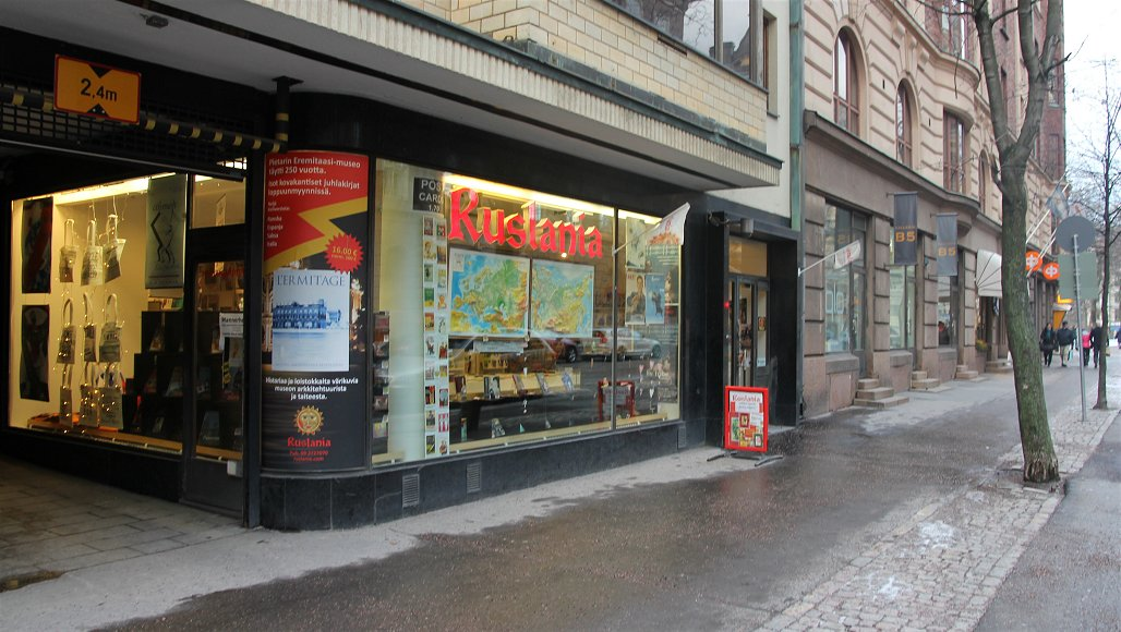 Ruslania Books on venäläisten kirjojen ja lehtien myymälä, maahantuoja ja kustannusliike. Yrityksen myymälä sijaitsee Bulevardilla Helsingin Kampissa.